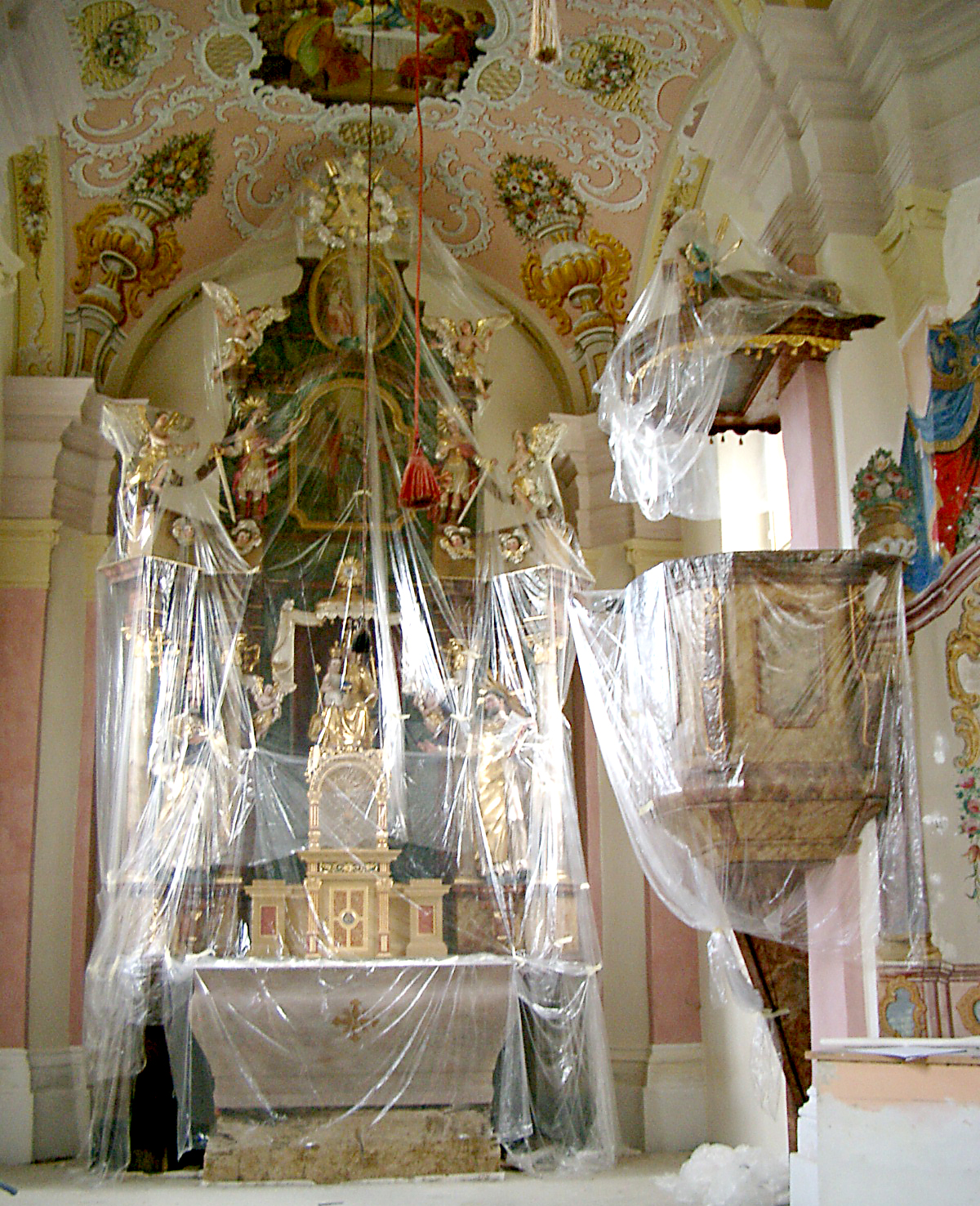 Katholische Pfarrkirche Mariae Namen